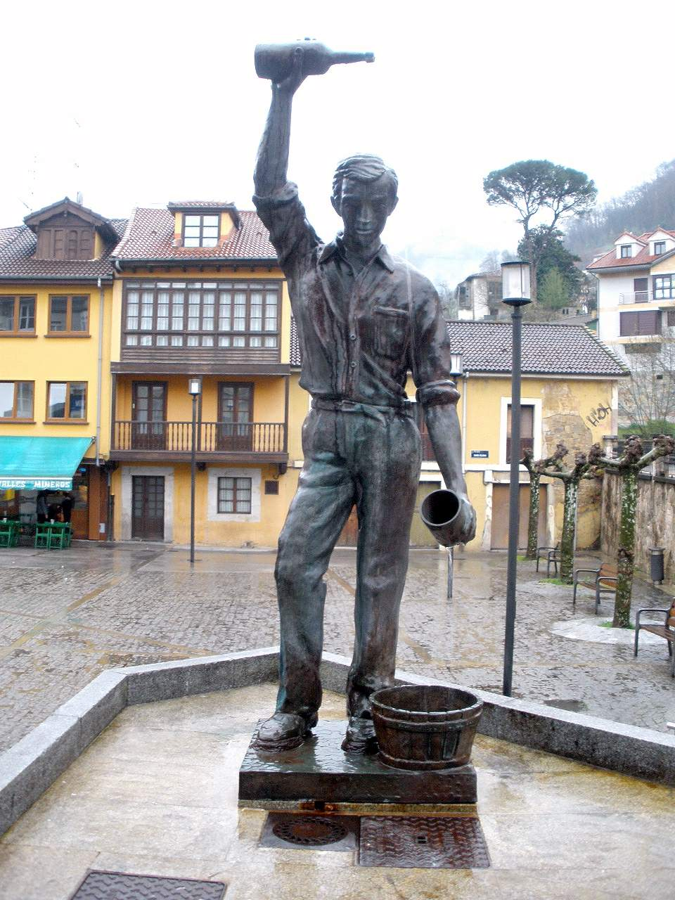 Mieres - Plaza del Requejo